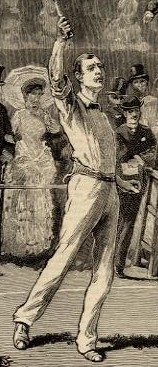 Wimbledonwinnaars Ernest Renshaw (1861-1899) + William Renshaw (1861-1904) op een ansichtkaart uit hun glorietijd